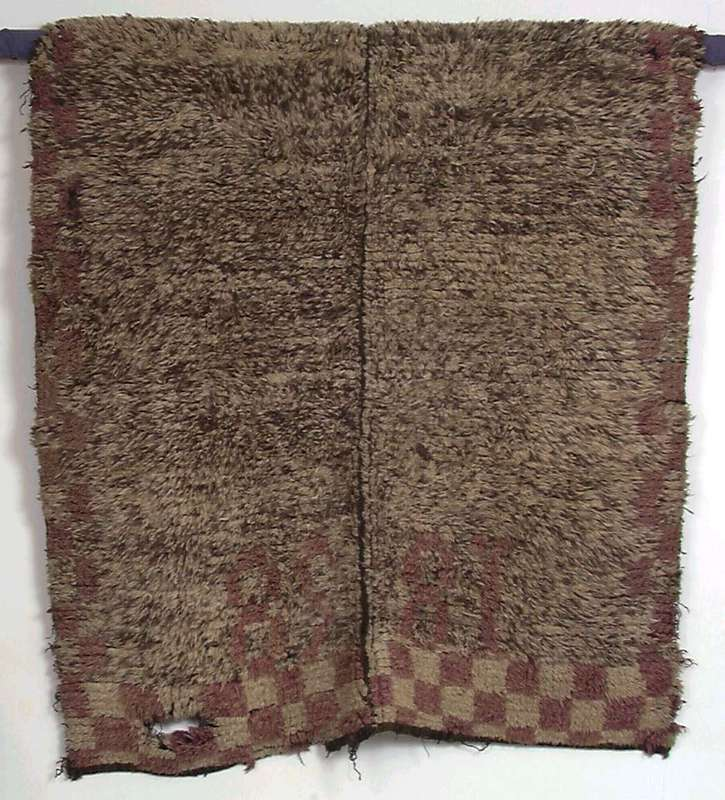 Rye sammensydd av to bredder og med knyttet floss. Den er datert 1858 og er innkommet fra Orkdal i Sør-Trøndelag. Foto Anne-Lise Reinsfelt / Norsk Folkemuseum NF.1916-0379.